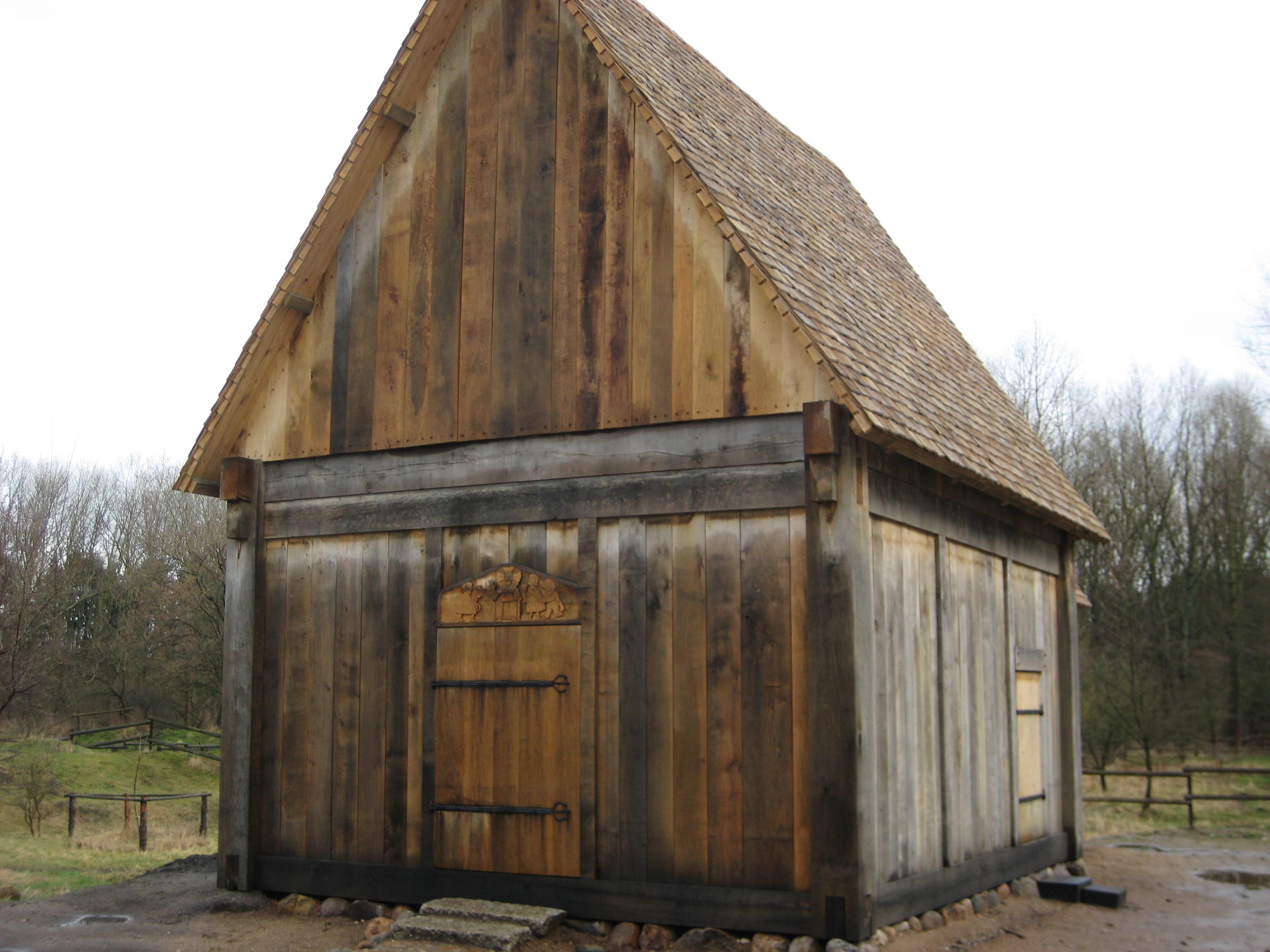 St. Nikolai, Nachbau einer norwegischen Stabkirche von etwa 1170 in Lübeck-Kücknitz